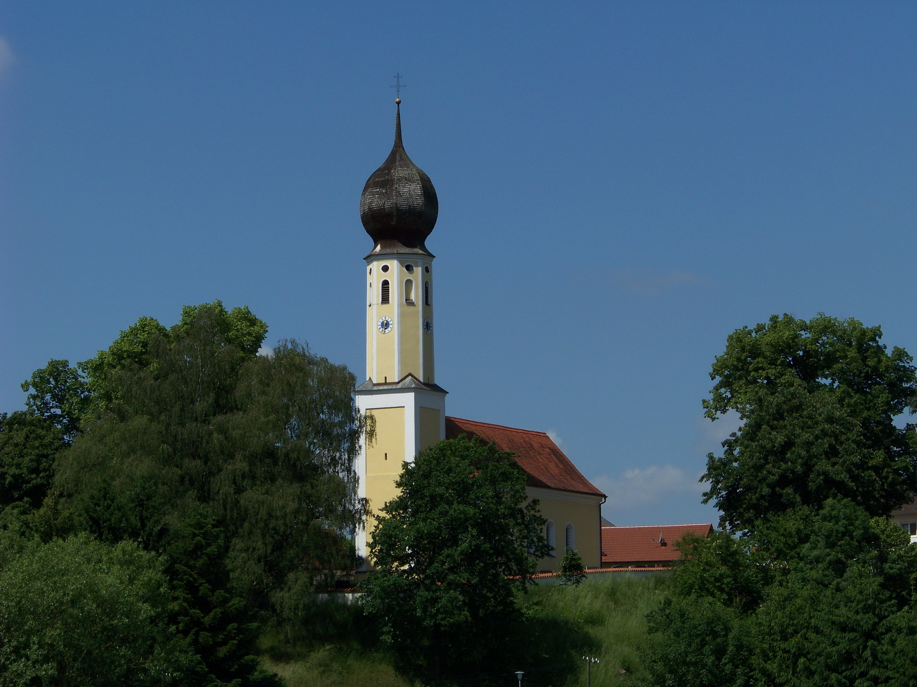 Arth bei Landshut. Katholische Filialkirche St. Katharina, Barockbau von Hans Widtmann, 1710; mit Ausstattung.